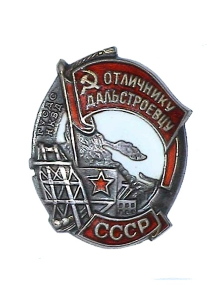 Знак "Отличник-дальстроевец"